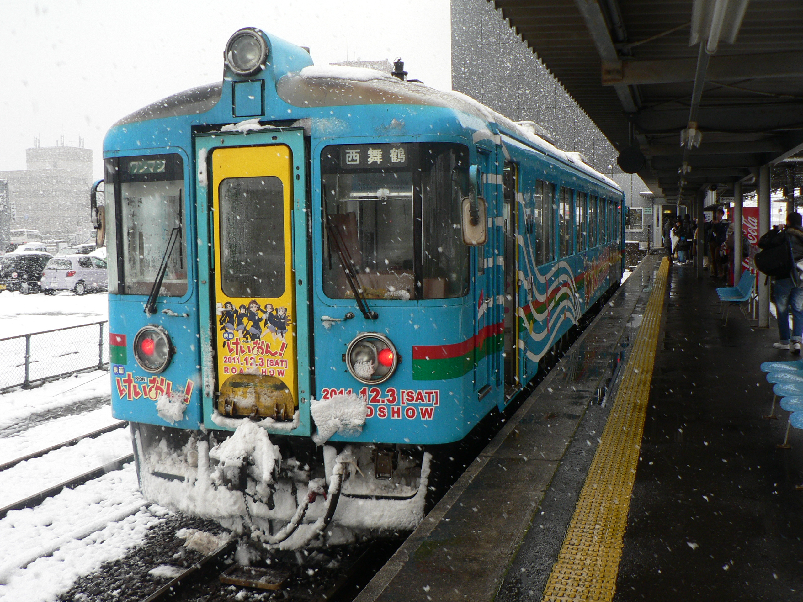 西舞鶴駅にてKTR700形705号車「映画けいおん!」ラッピング車両。